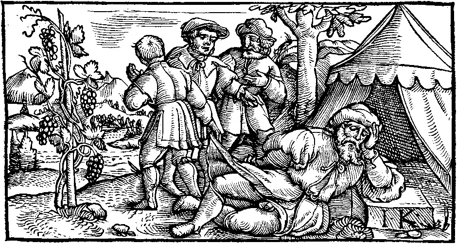 Der trunkene Noah wird von seinen Söhnen überrascht, aus: Sebastian Franck: Chronica des gantzen Teutschen lands, aller Teutschen völcker herkommen ..., Bern, Matthias Apiarius, 1. März 1539